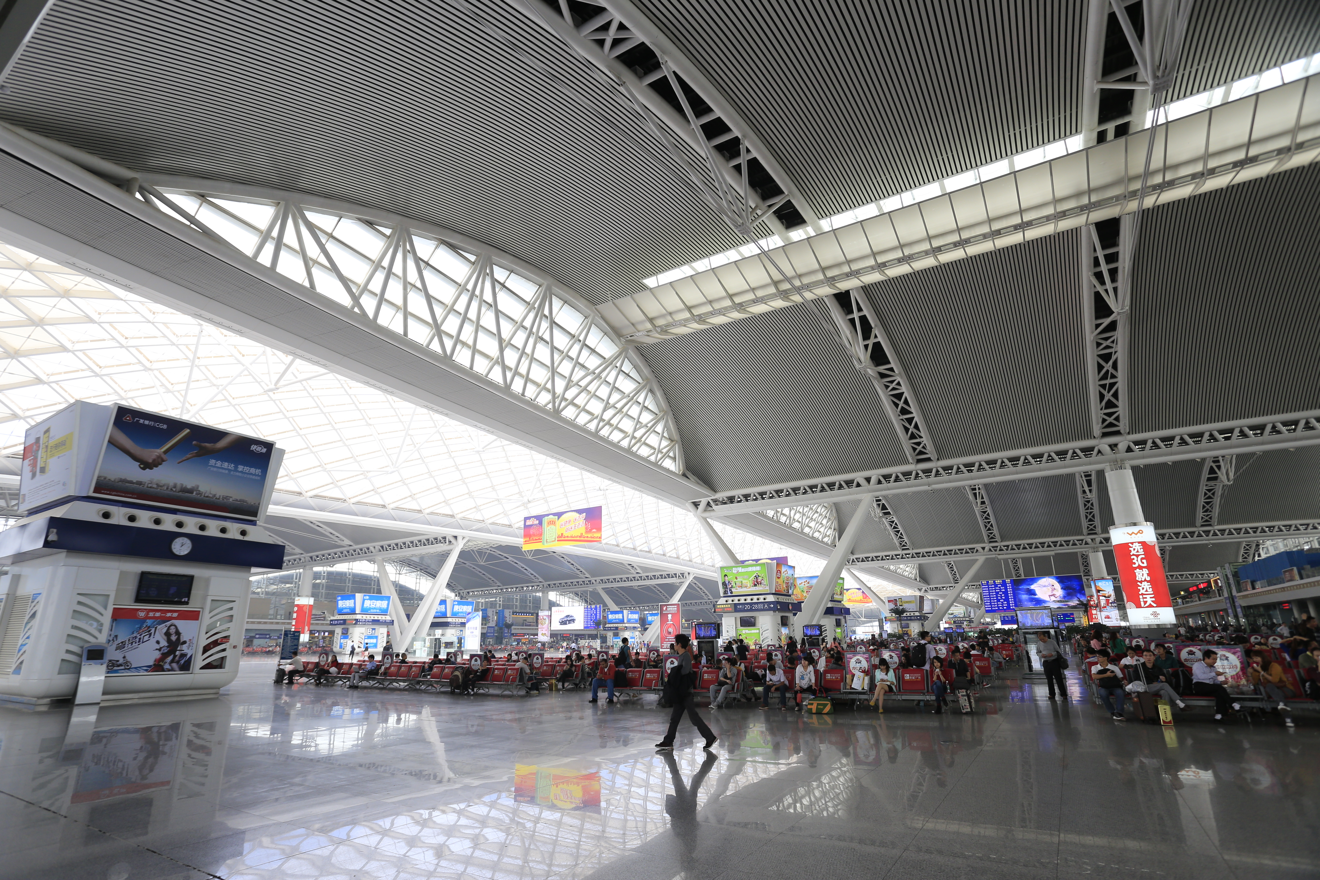 广州南站